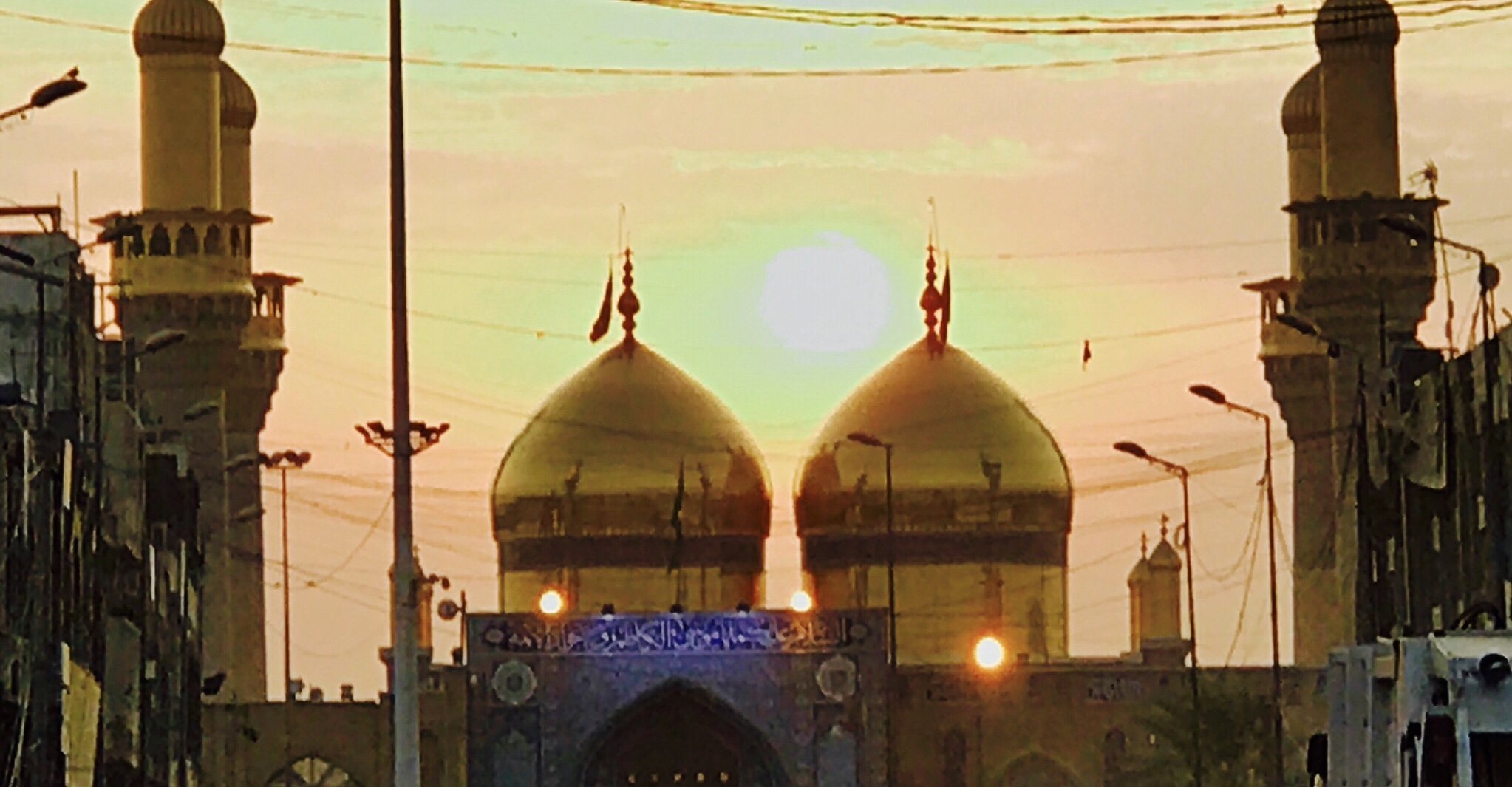 صوره لمرقد الامامين الكاظمين في مدينه الكاظميه المقدسه في وقت الغروب بواسطة(iphone7plus)